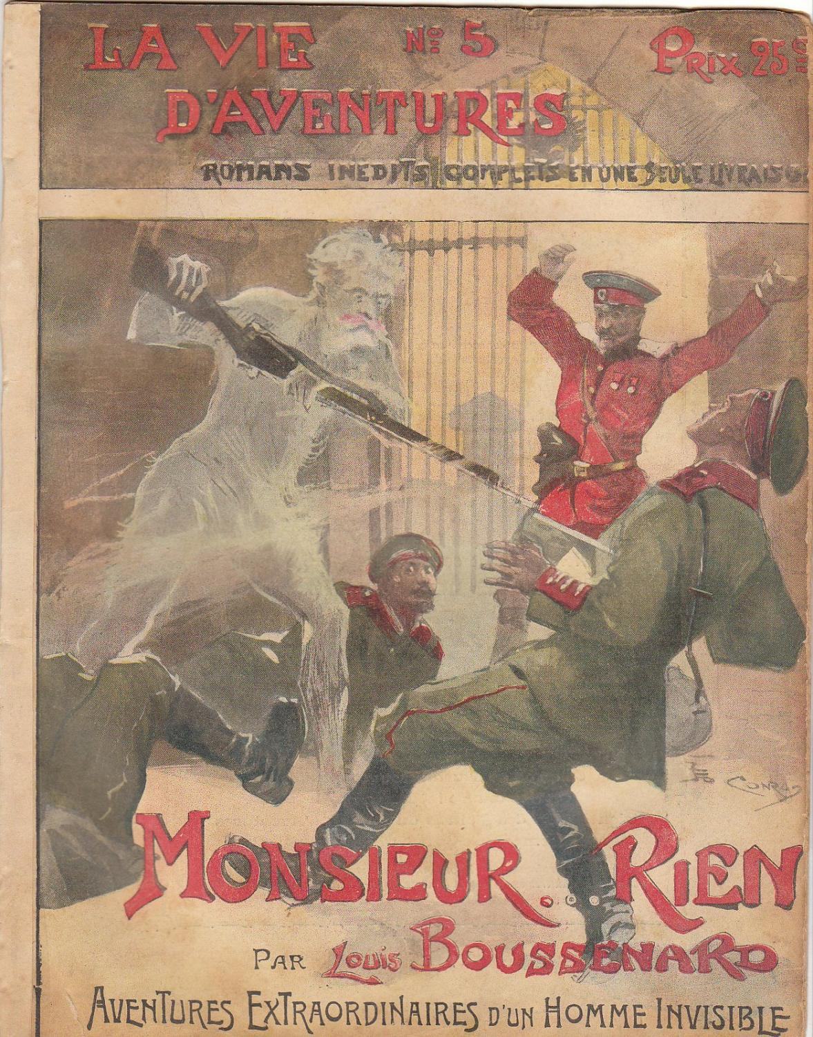 Monsieur... Rien ! Aventures extraordinaires d'un homme invisible par Louis Boussenard, fascicule n°5 de la collection « La Vie d'aventures », octobre 1907, illustration de Georges Conrad. « La Vie d'aventures » constituait une série de fascicules populaires éditée par Le Journal des voyages, 32 p. au format 22 x 28,5, ornée de couvertures couleurs et d'illustrations intérieures en noir par Georges Conrad. Les textes, romans inédits complets, sont sur 2 colonnes. Jacques Prévert cite ce roman populaire dans le texte « Enfance » publié en 1959 dans l'hebdomadaire Elle : « Il y avait aussi « La Vie d'aventures », une collection merveilleuse : l’un des fascicules s’appelait Monsieur Rien. C’était l'histoire d’un homme invisible qui voulait tuer l’empereur de Russie. »